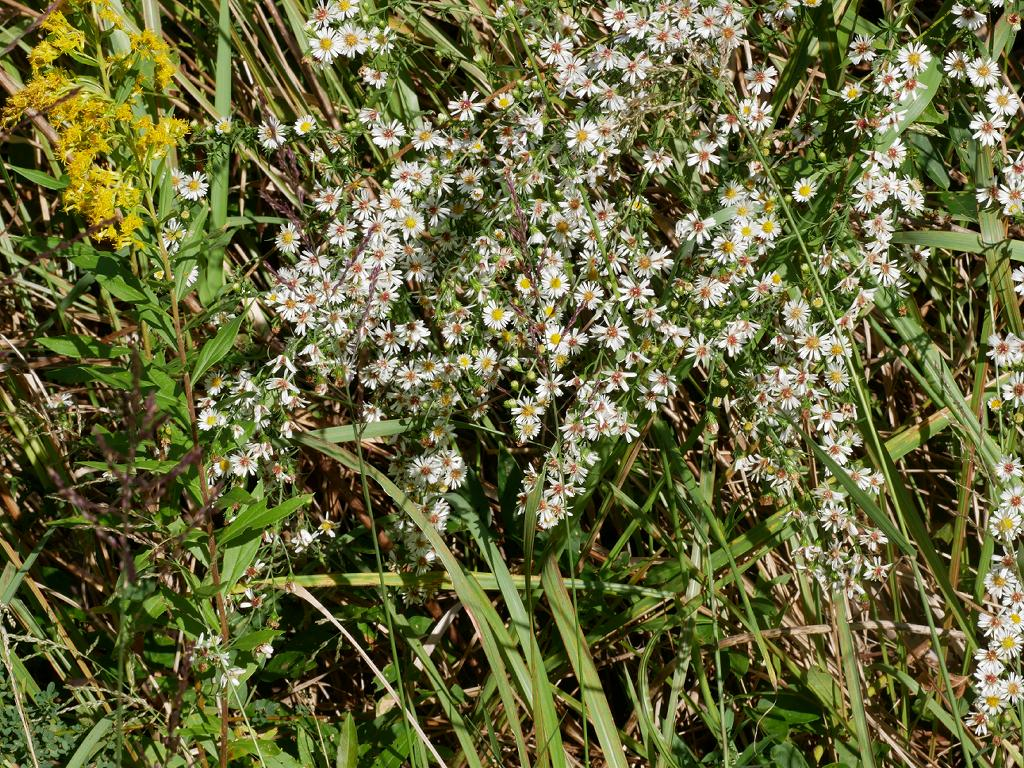 2019/10/25 和歌山県田辺市：Tanabe City. Wakayama Pref. Japan